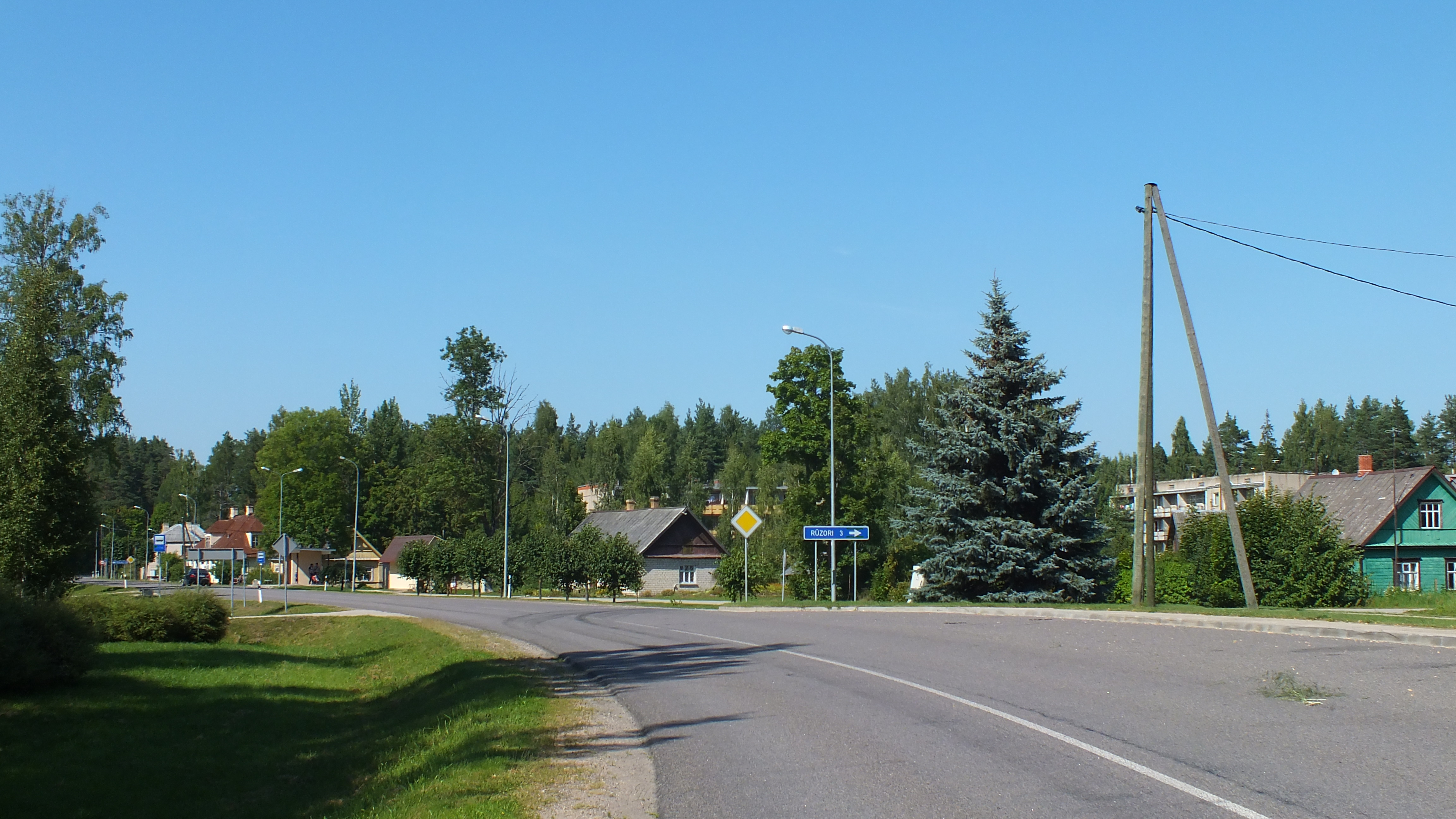 Autoceļš P49 Mērdzenē